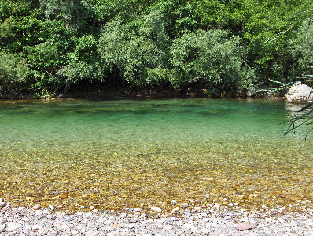 L'endroit, sur la Neretva, en Bosnie-Herzétovine, où la truite aux lèvre molles (Salmo obtusirostris) a été capturée le 22 juillet 2004